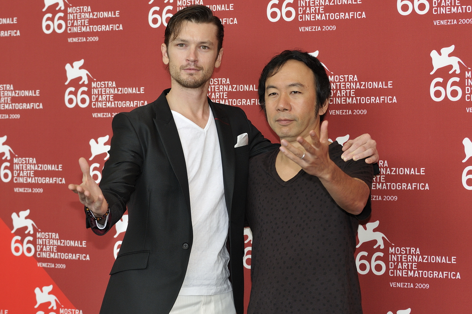 66ème Festival du Cinéma de Venise (Mostra), 4ème jour (05/09/2009)